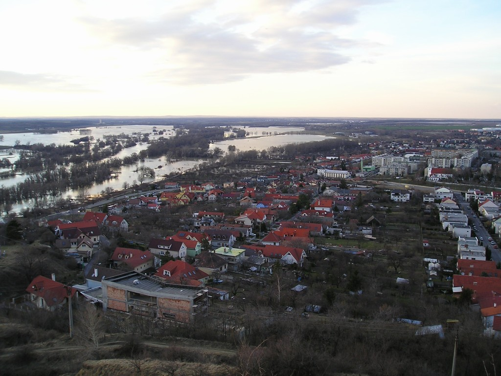 Flood in Bratislava-Devínska Nová Ves